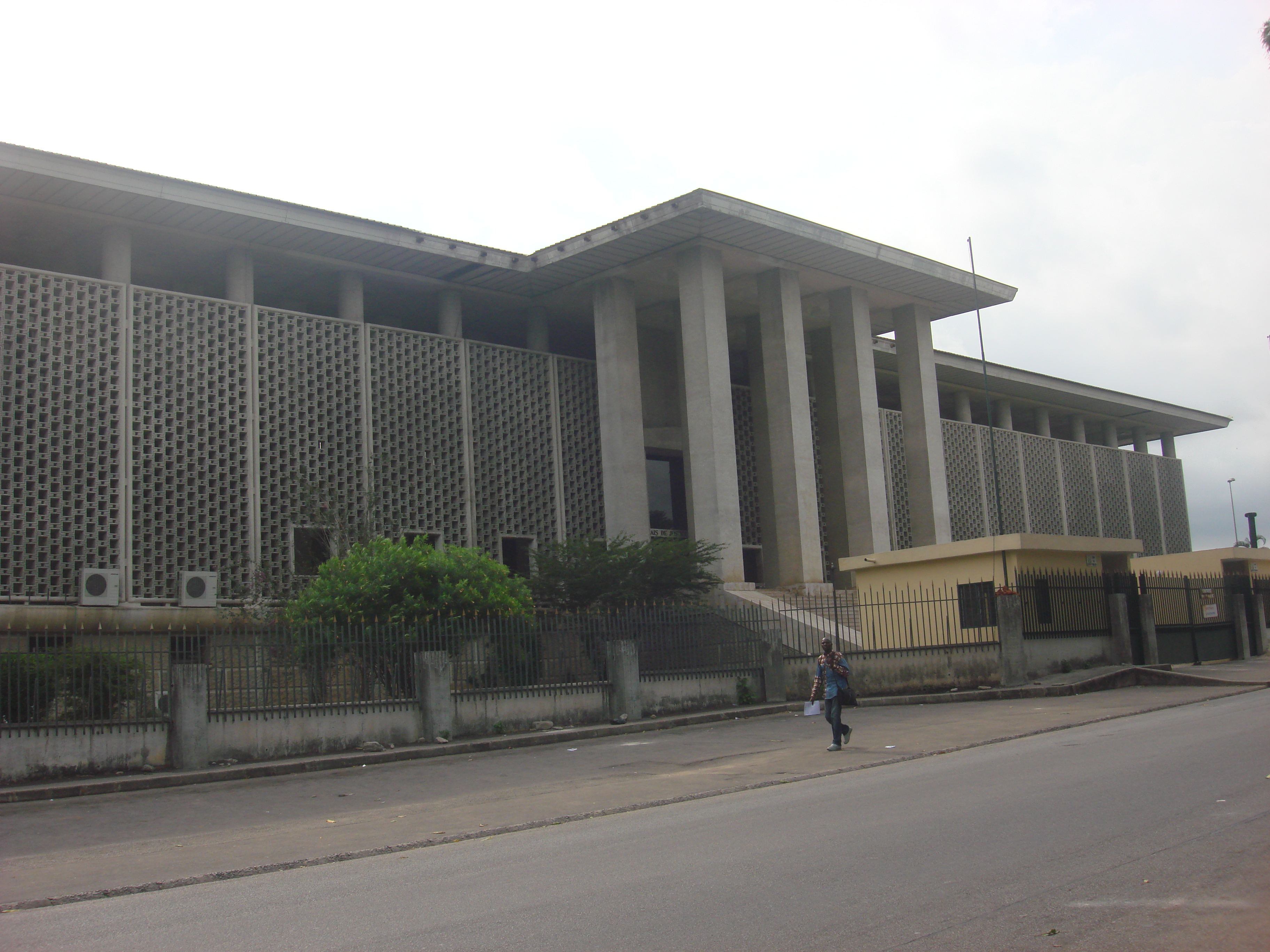 Tribunal de première instance d'Abidjan (Côte d'Ivoire)